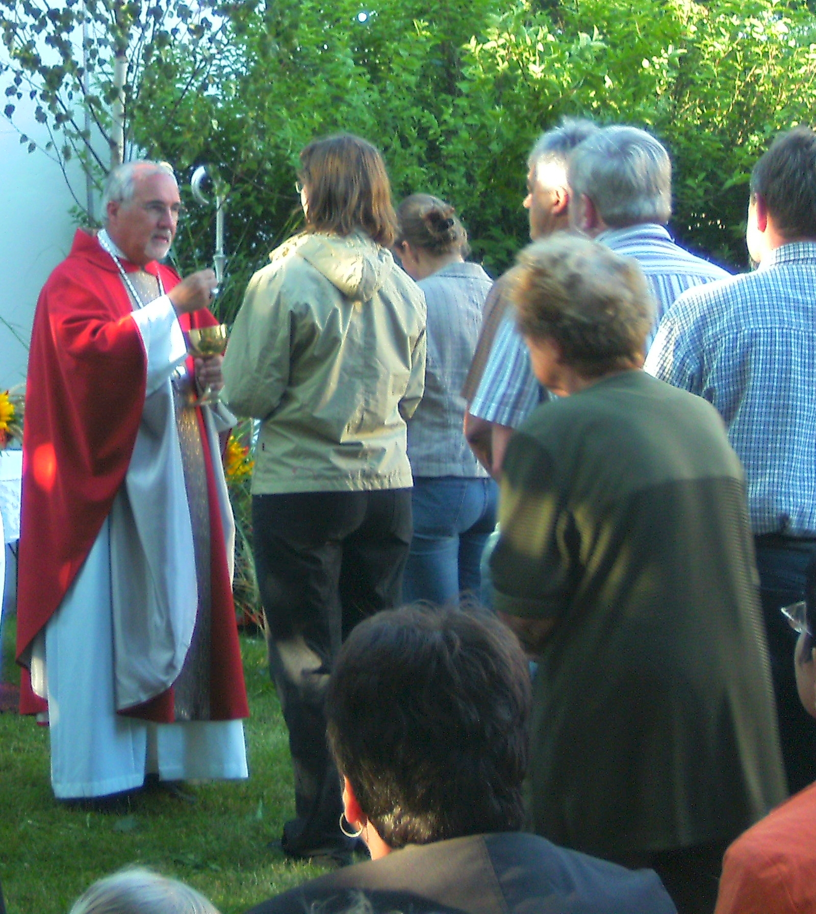 Bischof Gebhard Fürst bei einem Pontifikalamt in Bechtenrot bei Erolzheim